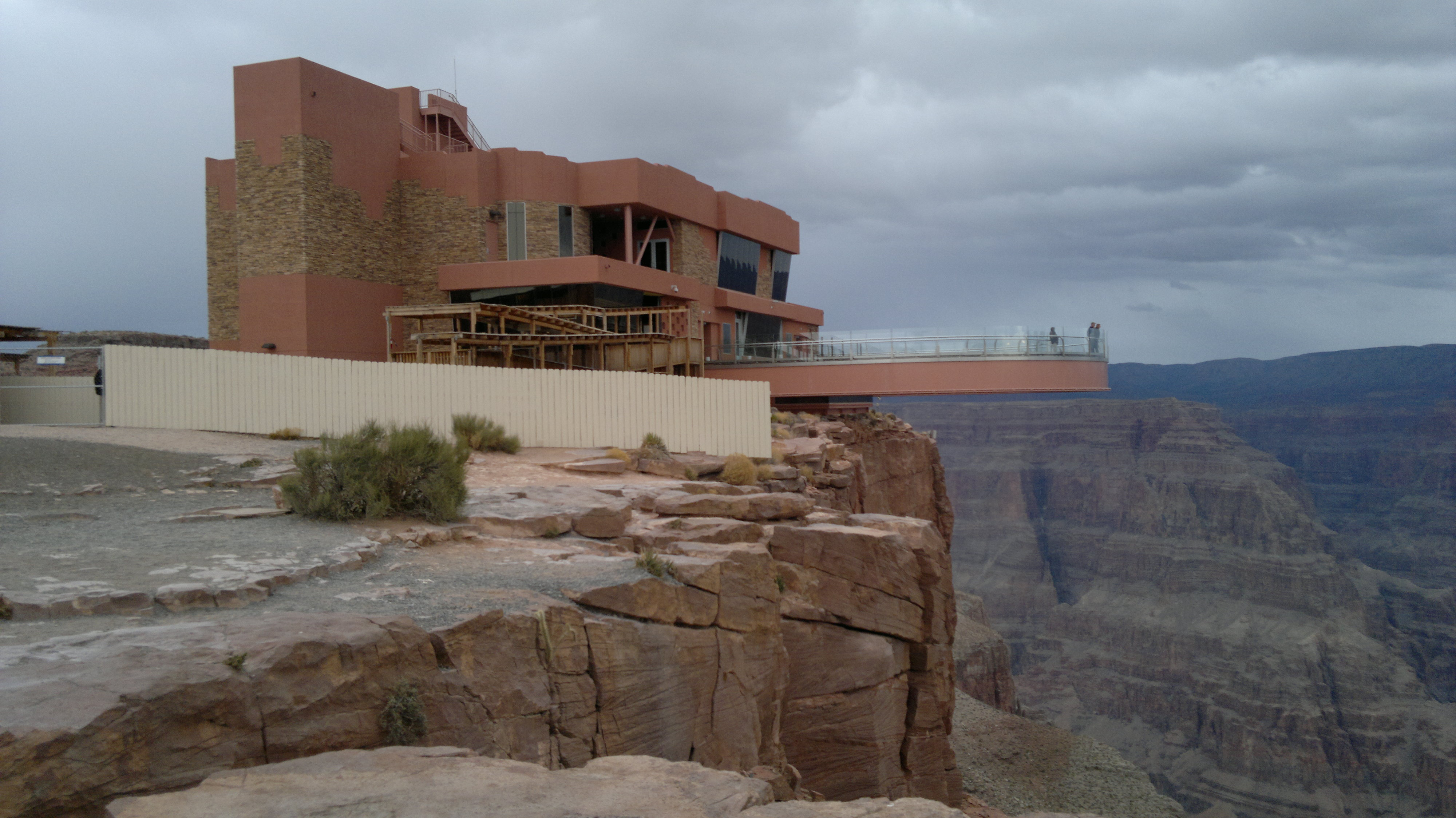 大峡谷